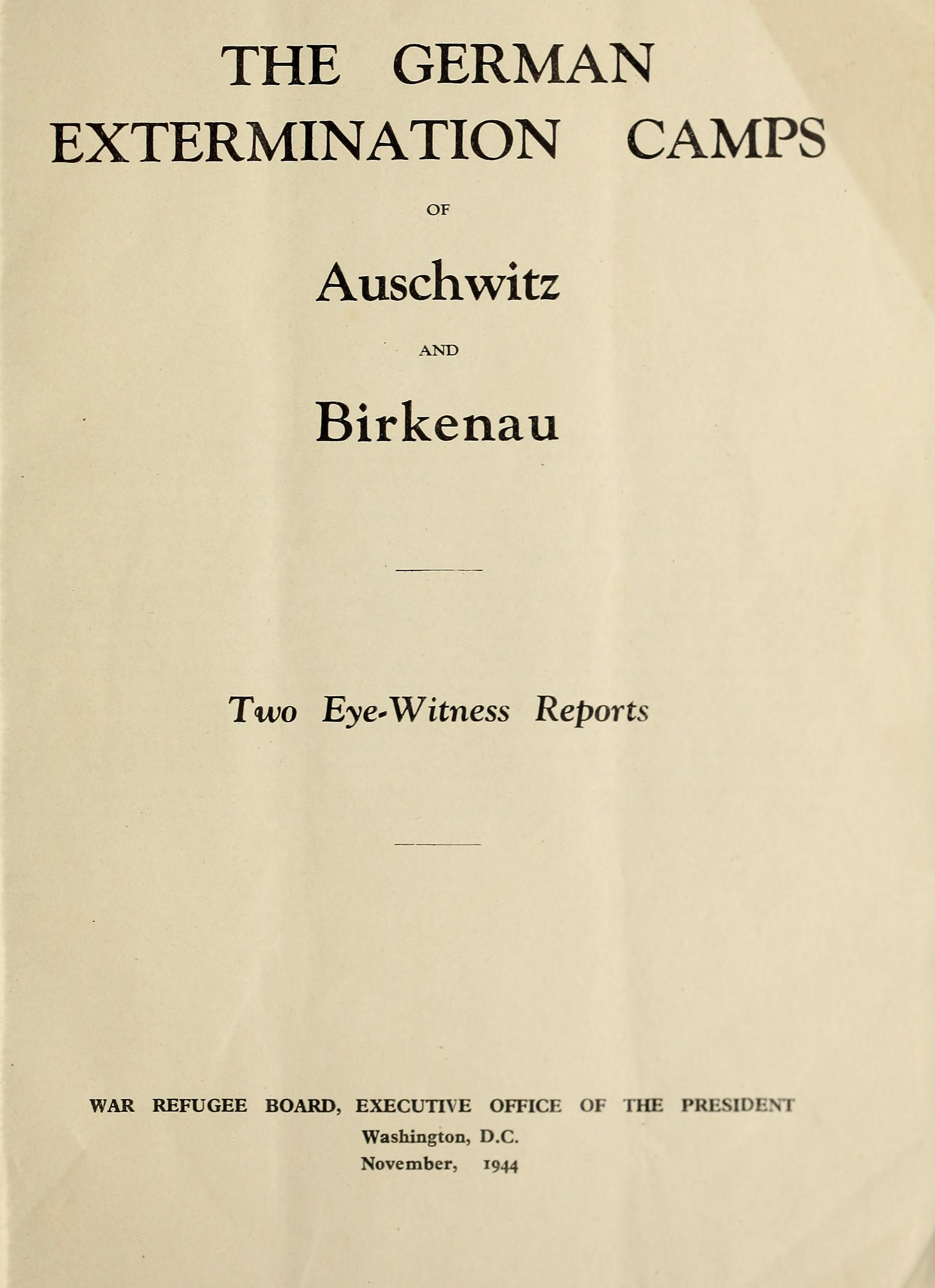 The German extermination camps Auschwitz and Birkenau - title page